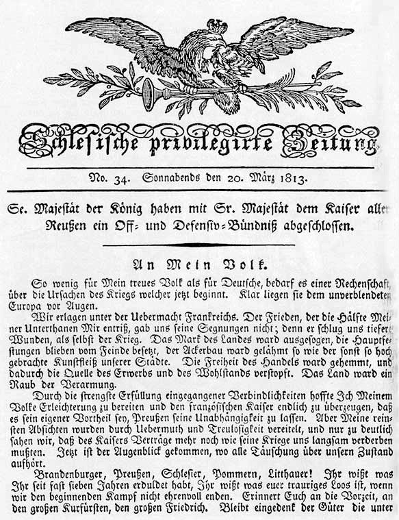 Beginn des Appells An Mein Volk, mit dem Preußens König Friedrich Wilhelm III. im März 1813 zum Freiheitskrieg gegen das napoleonische Frankreich aufrief.